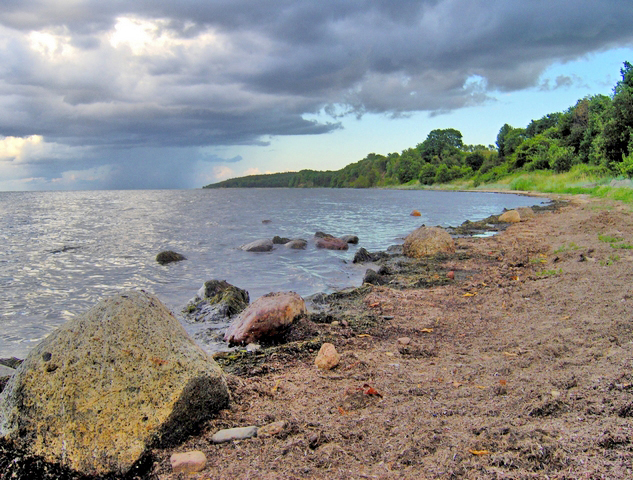 Zatoka Pucka, na południe od Pucka, w kierunku południowym, województwo pomorskie, lato 2006 Bay of Puck, south of Puck, southwards, Pomorskie voivodeship, Poland, Baltic Sea,summer of 2006 Autor: Krzysztof